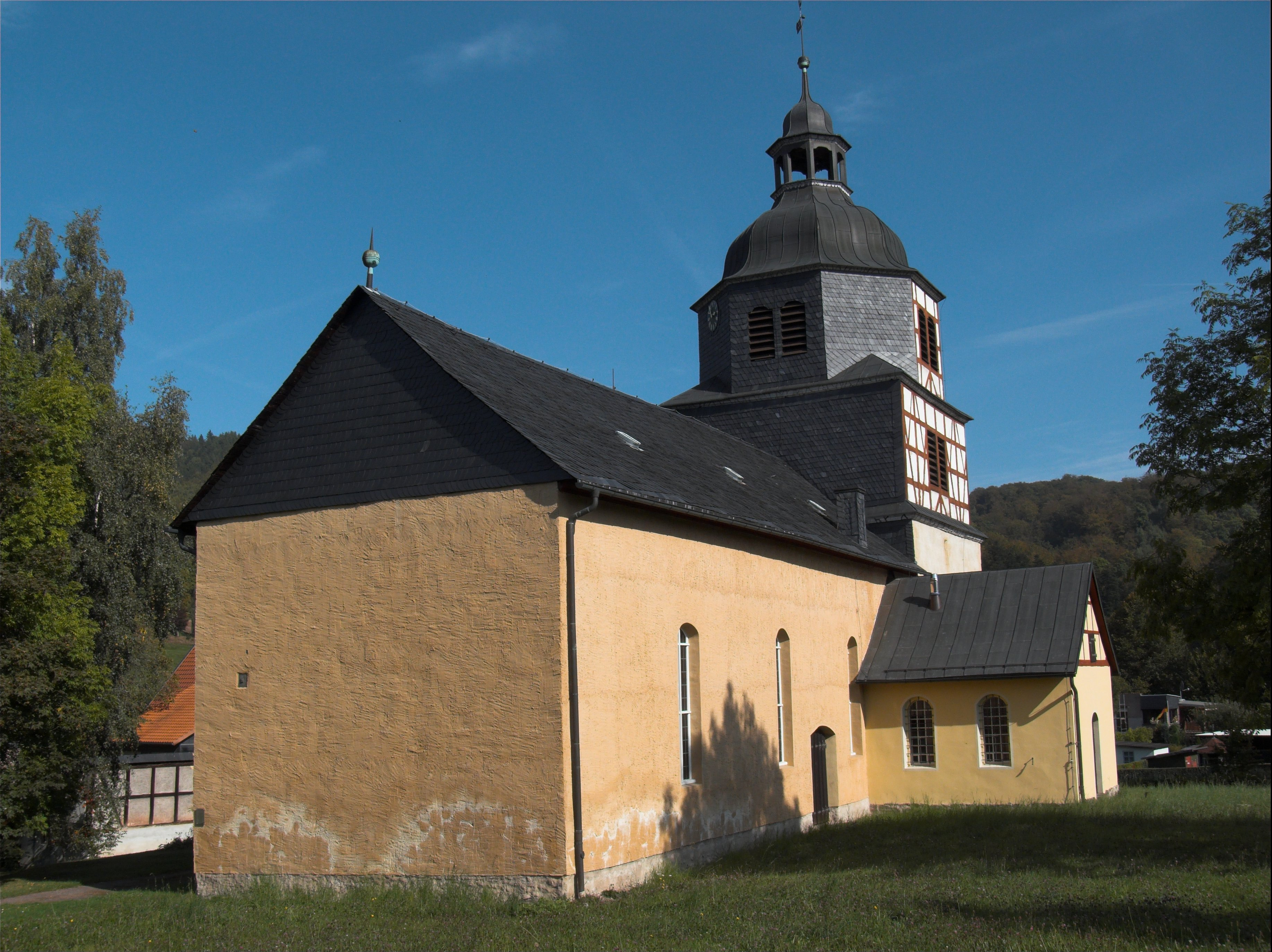 St. Katherinen Kirche in Sülzhayn, einem Ortsteil von Ellrich